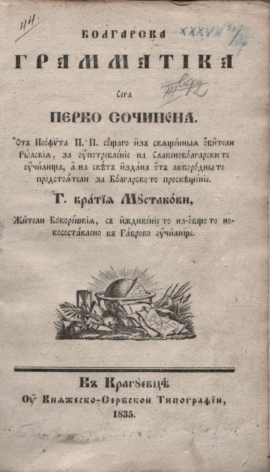 Корица на Българска граматика на Неофит Рилски.